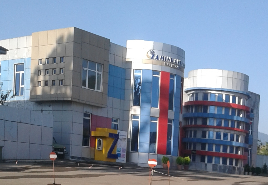 Здание банка в Пенсарском базаре